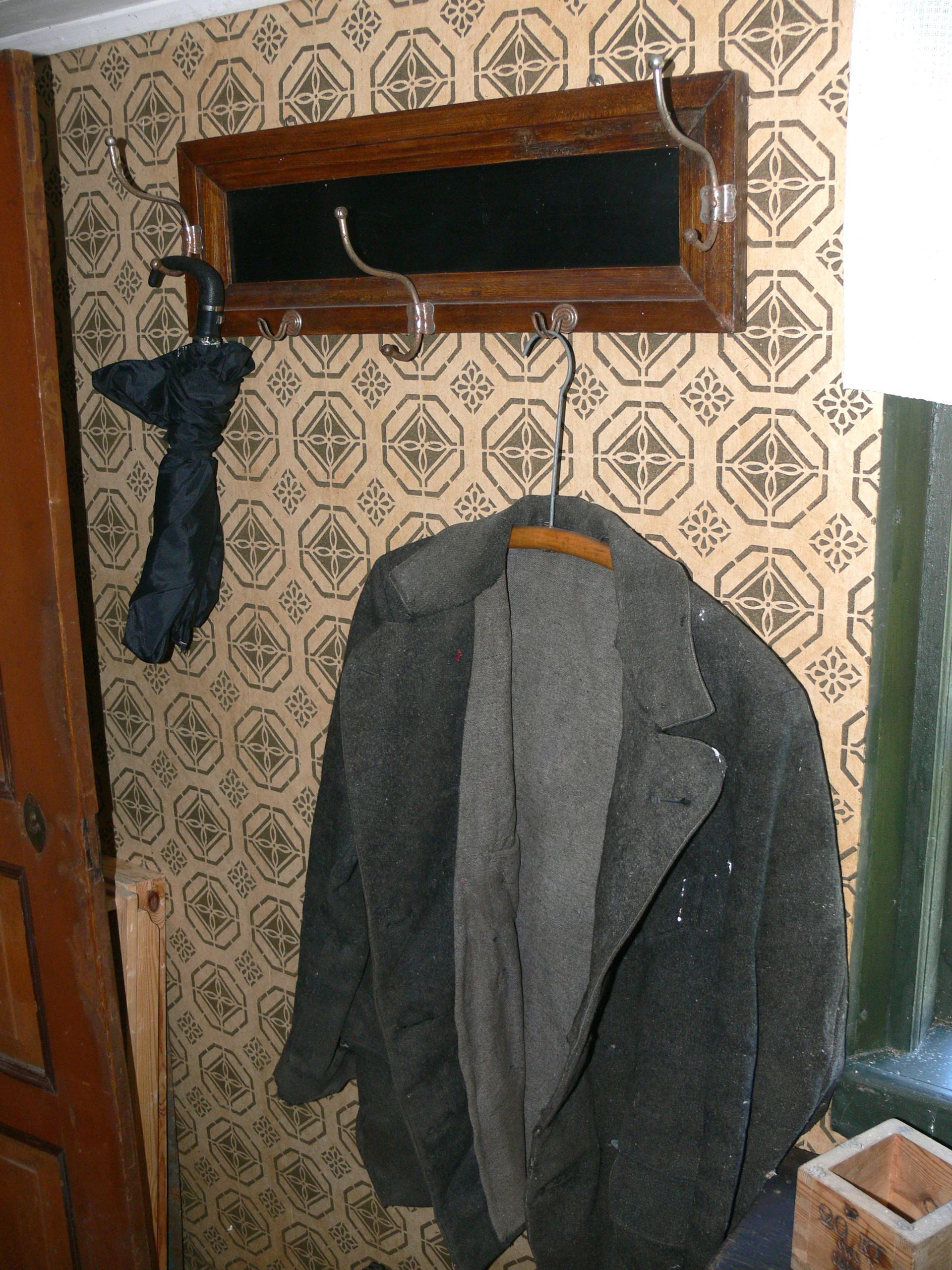 Bunge Museum auf Gotland. Hof ( 19.Jhdt. ): Garderobe